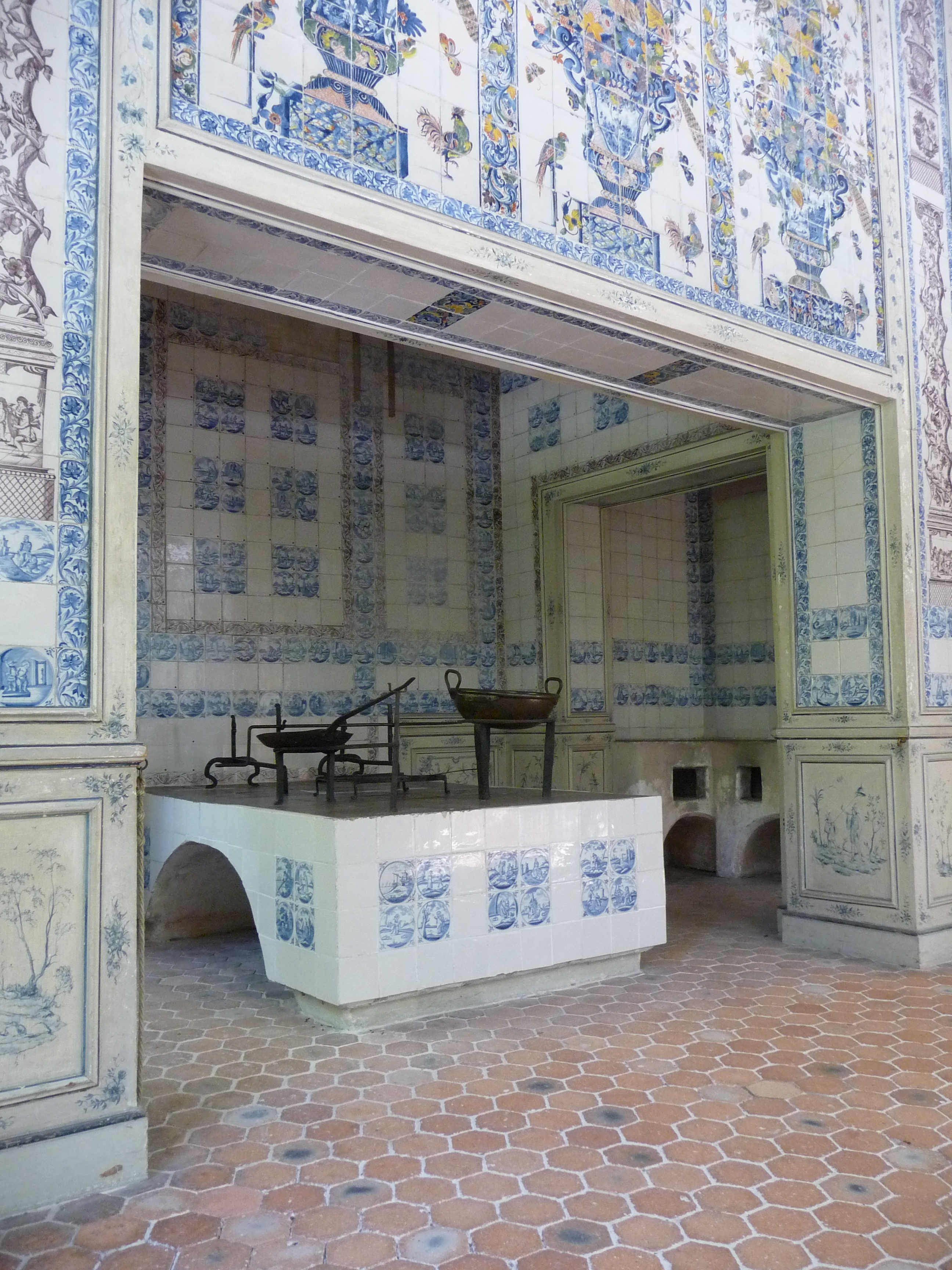 Küche der Amalienburg: im Vordergrund befindet sich ein Herd herkömmlicher Bauart. Das Feuer wurde auf der Ofenplatte entfacht. Dahinter ist ein Castrolherd zu sehen, dessen Feuer in gemauerten Mulden weniger Heizmaterial beanspruchte.